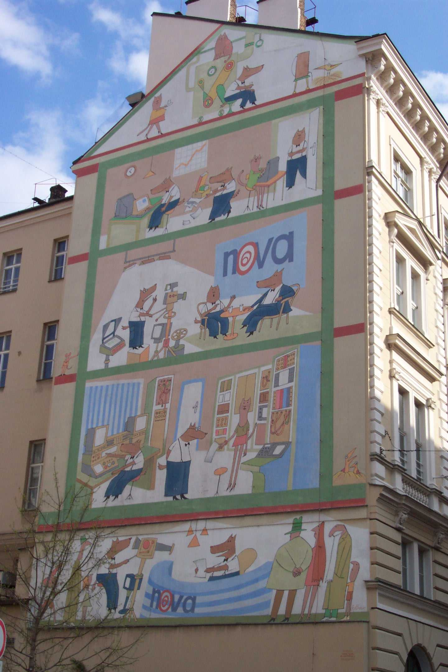 Façade of the former TV Nova building - Fasáda bývalé budovy TV Nova ve Vladislavově ulici